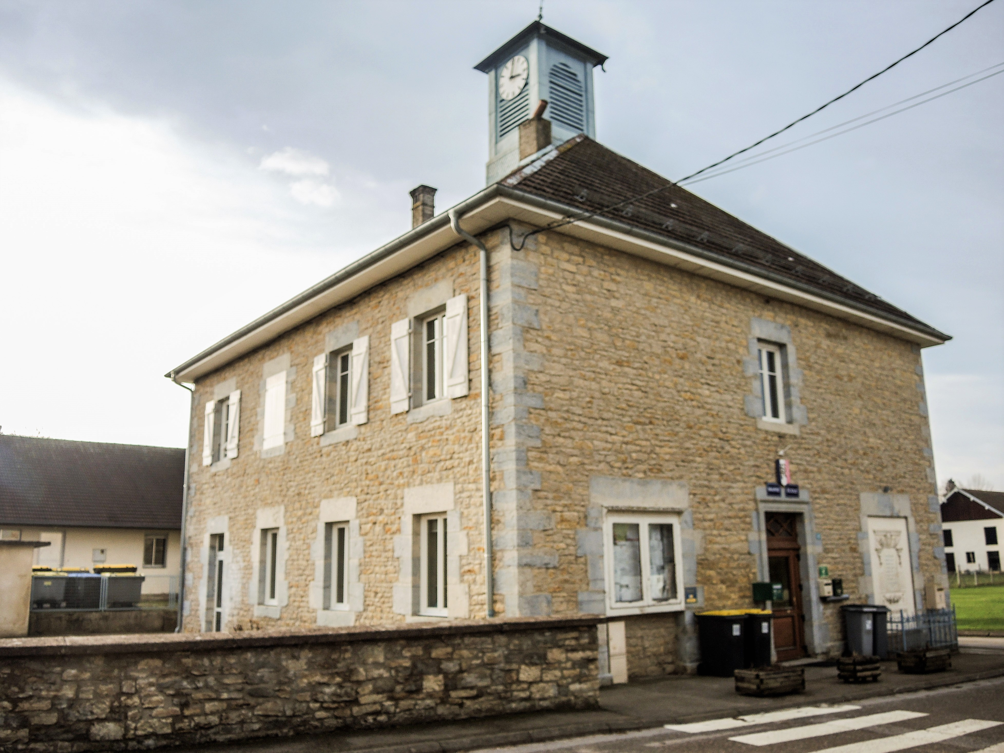 Mairie et ancienne école. Lanans. Doubs